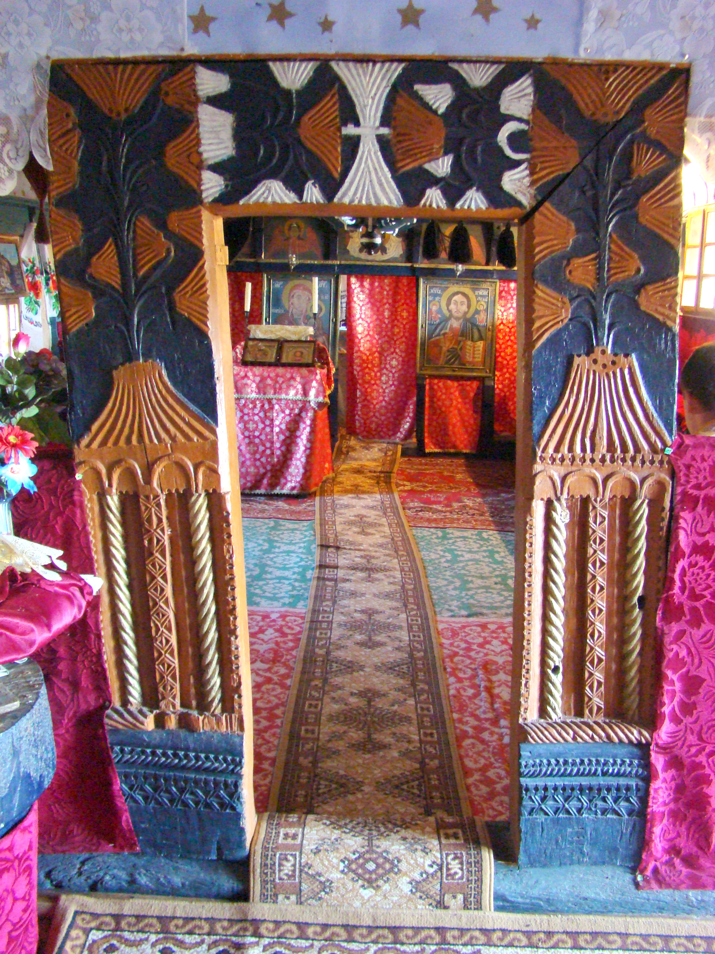 Biserica de lemn „Sfinții Arhangheli” din Fânațele Silivașului, județul Bistrița-Năsăud